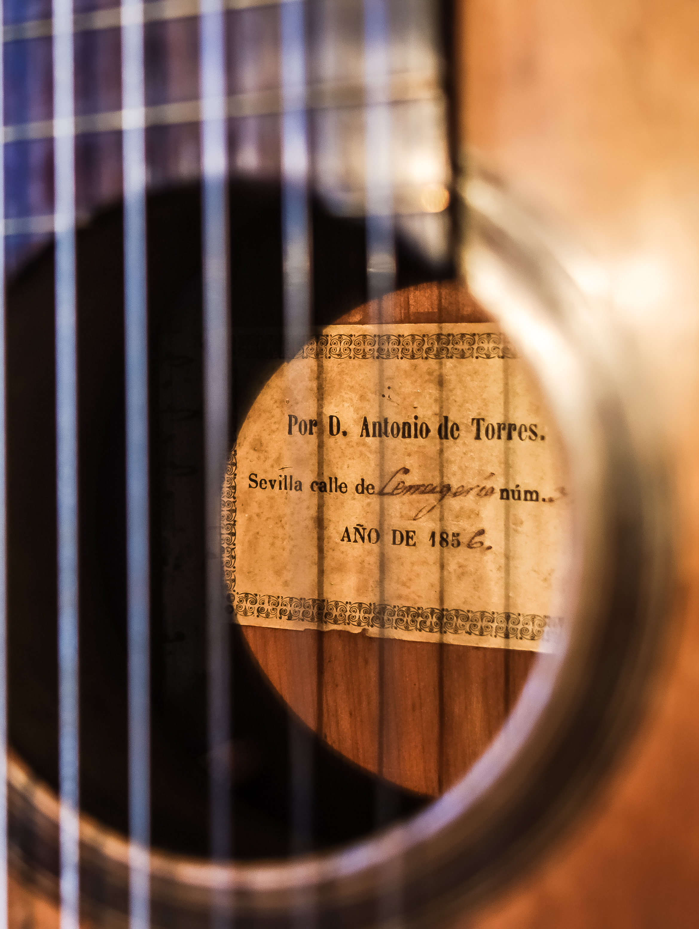 Antonio de Torres "La Leona" Sevilla 1856 - Schallloch mit Label (Foto: Nina Simone)